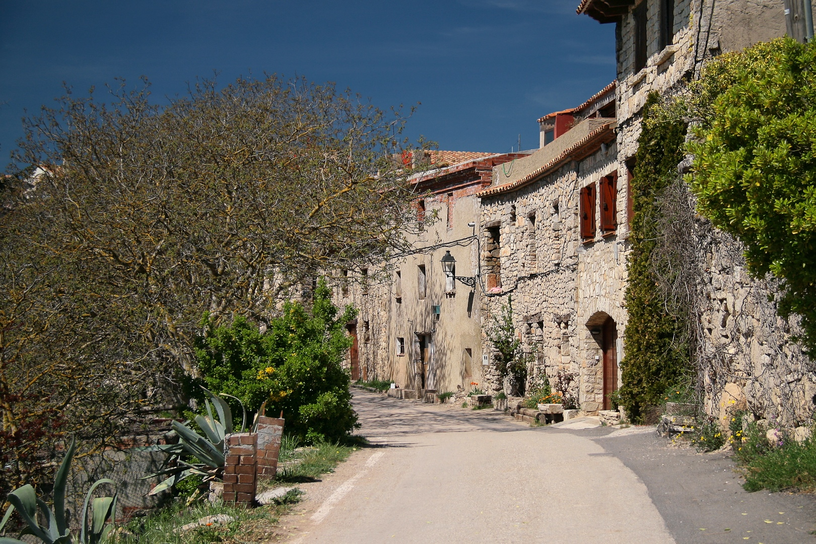 Rojals (Montblanc).